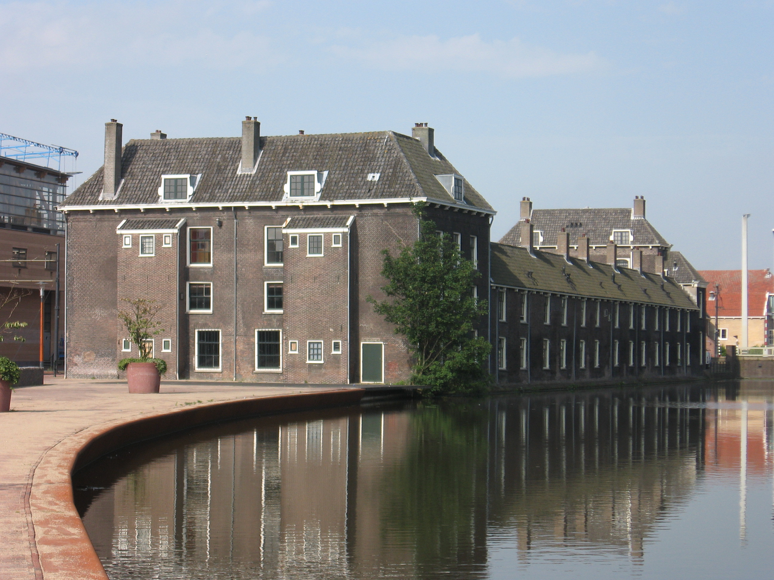 Schiedam - Overschiesestraat 1 001.jpg, rijksmonument